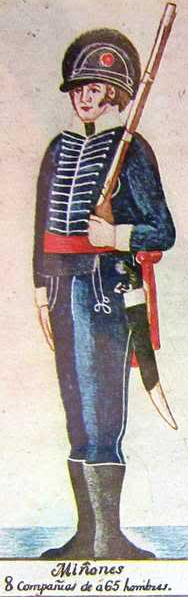 Uniforme de soldado del Tercio de Miñones